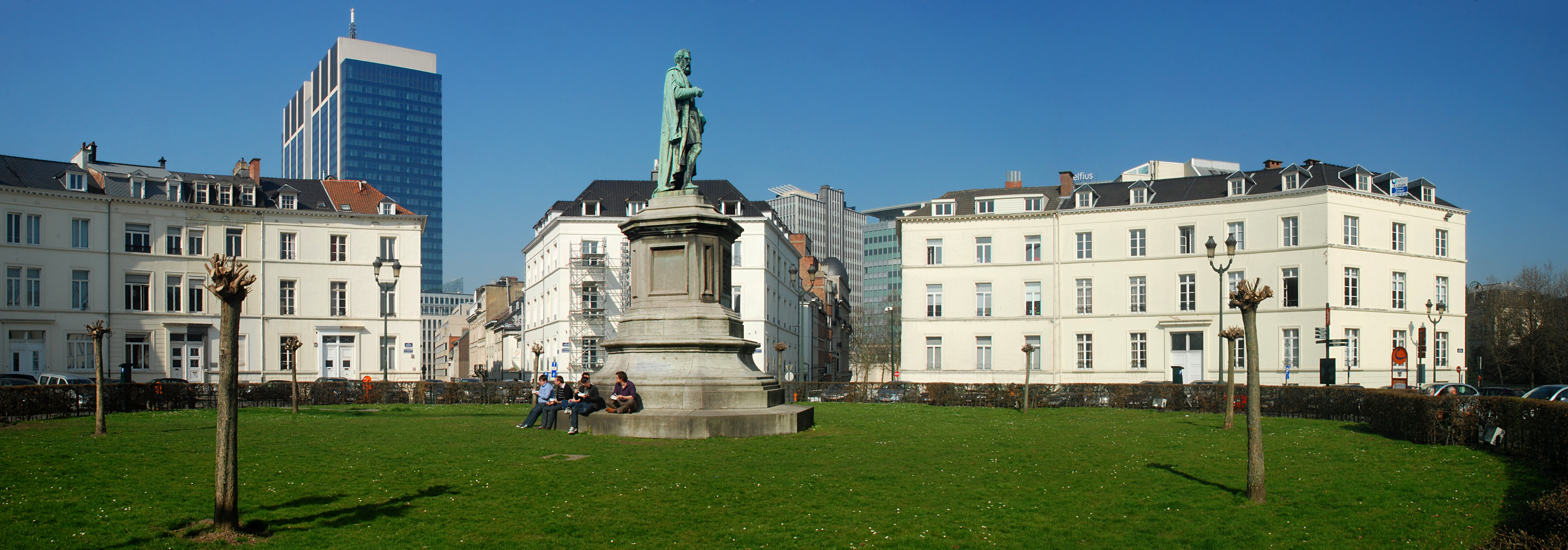 Belgique - Bruxelles - Place des Barricades - Statue d'André Vésale Photo panoramique (assemblage de 3 photos via MS ICE)